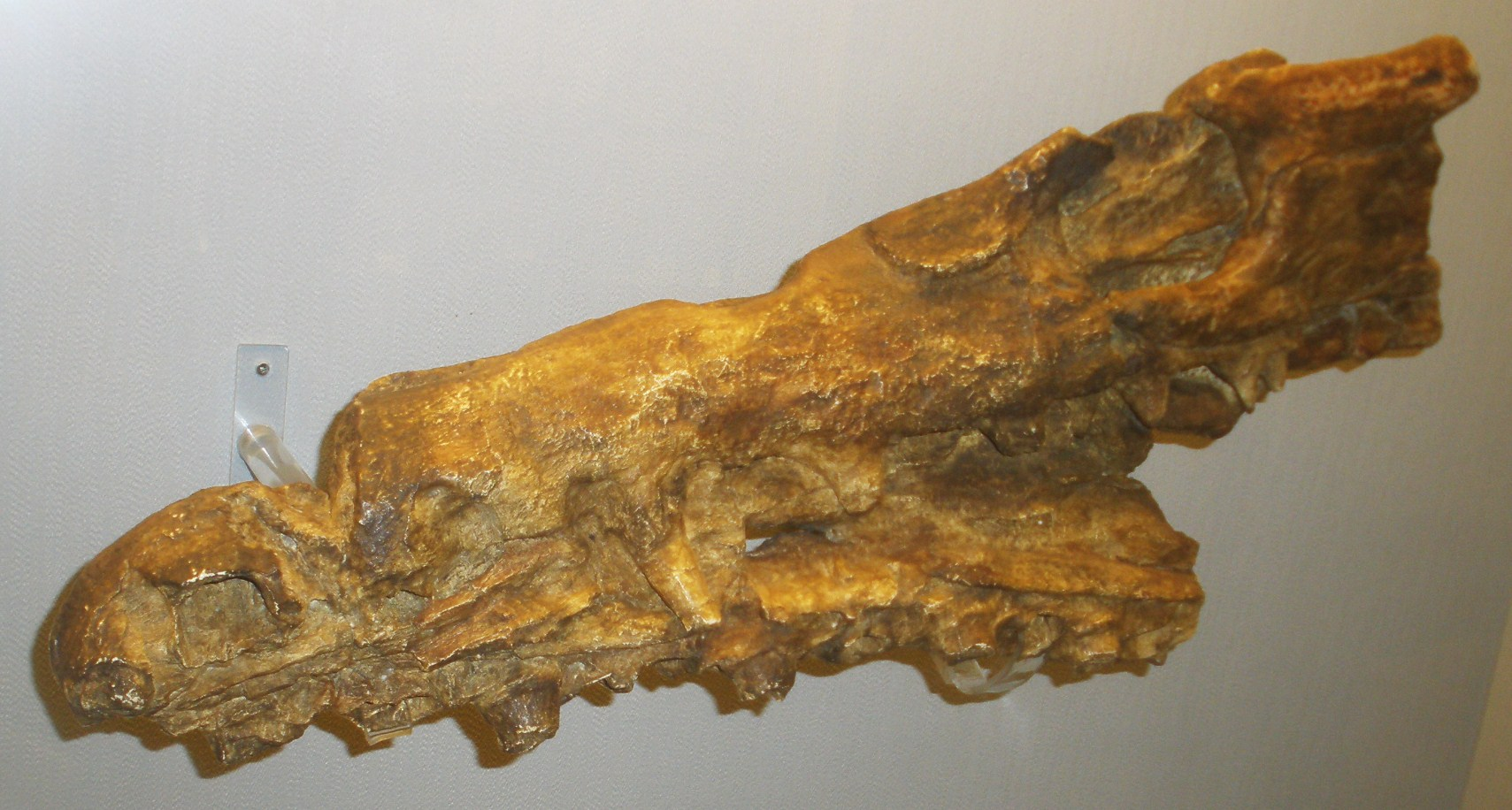 Fossil of Goronyosaurus, an extinct reptile- Took the picture at Museo di Paleontologia di Firenze